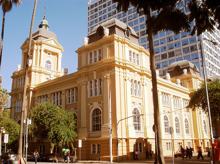 Museu de Arte do Rio Grande do Sul, back view. Porto Alegre, Brasil.